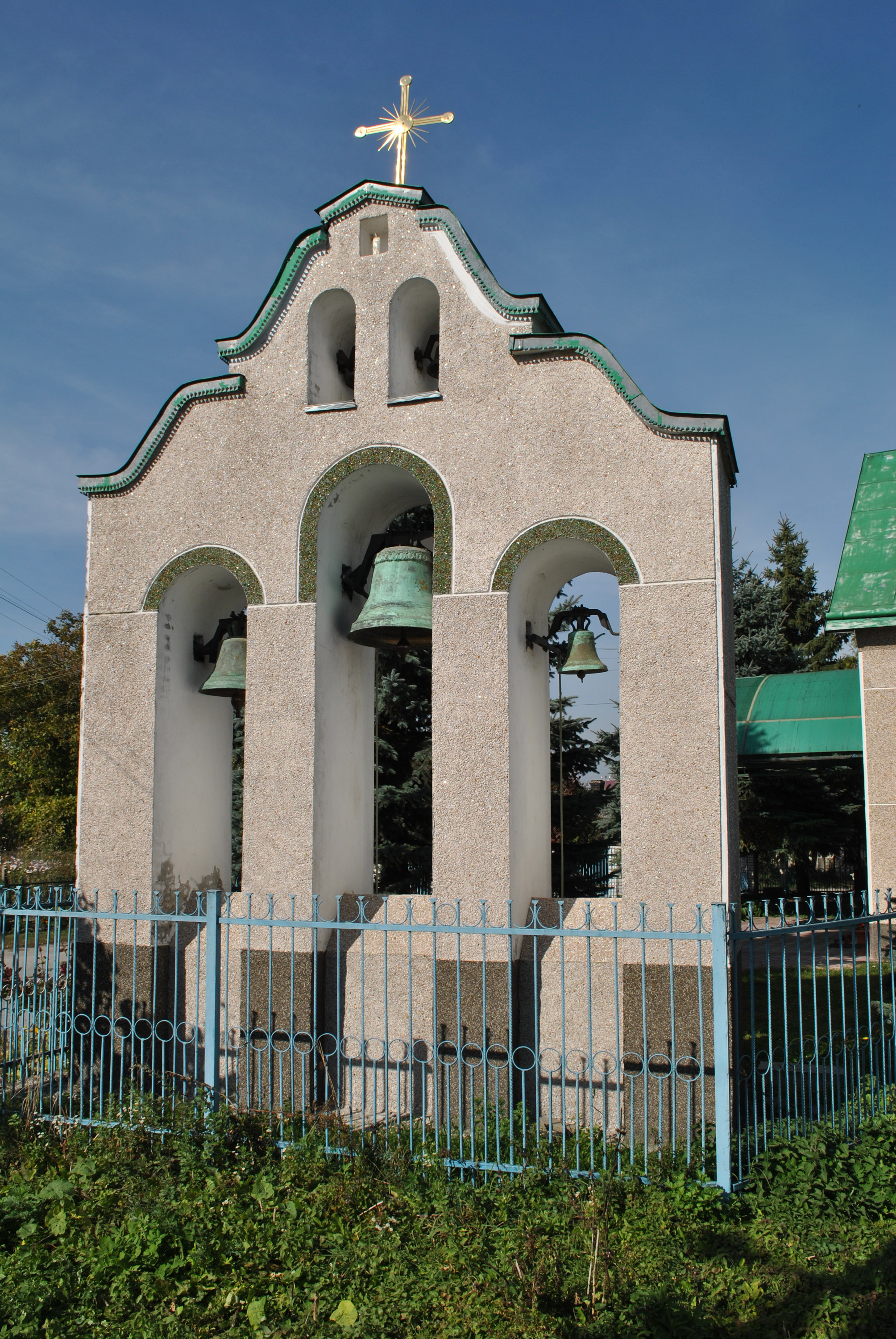 Дзвіниця церкви Св. Миколая (мур.) у селі Біла Тернопільського району тернопільської області.